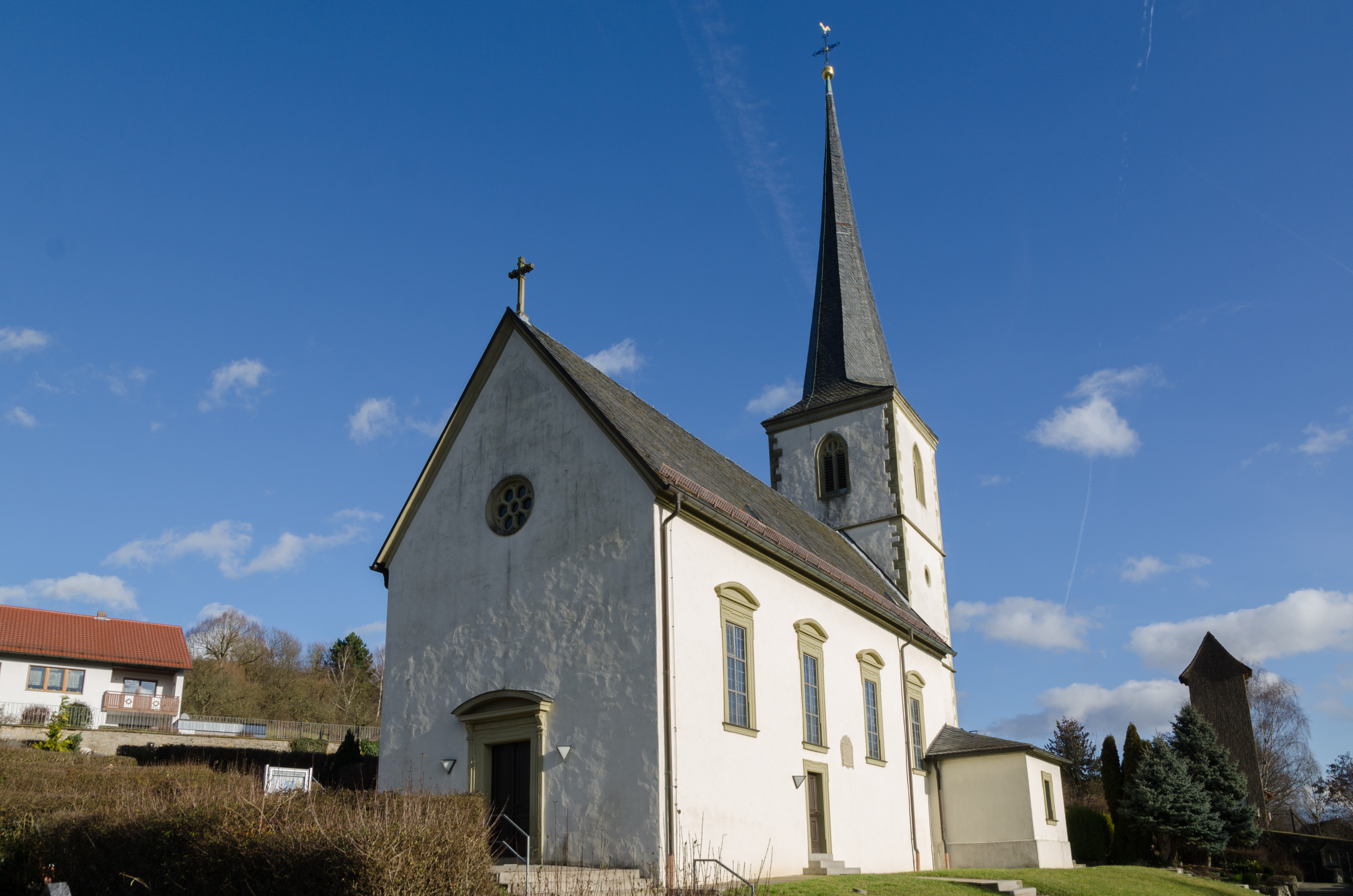 Arnstein, Heugrumbach, Kirchweg 2, Katholische Filialkirche St. Margareta